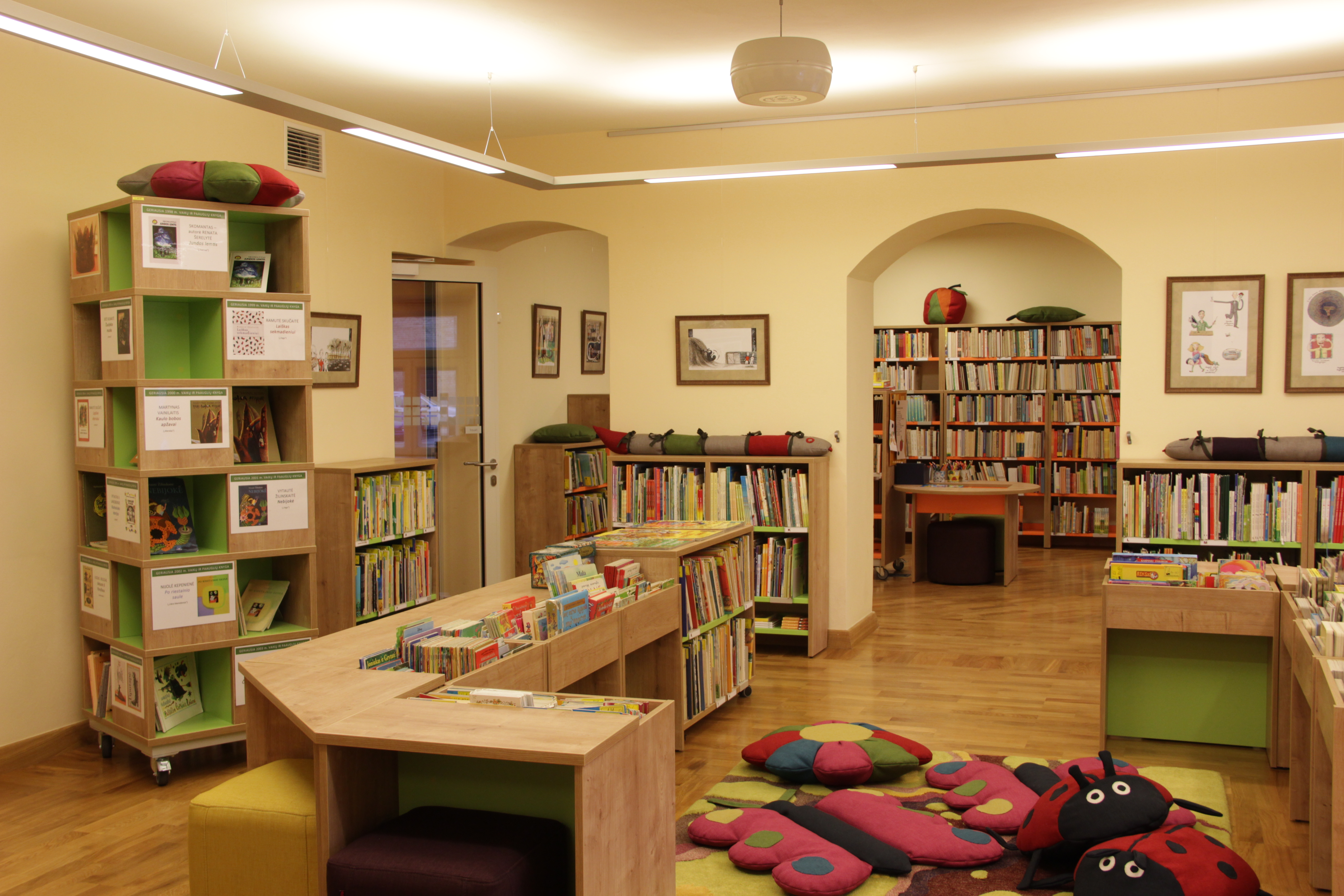 Mažiausiems Vaikų bibliotekos skaitytojams skirta erdvė Vaikystės pieva. Čia vaikai gali laisvai rinktis knygutes iš lengvai net mažiausiems pasiekiamų lentynų ir skaityti ar klausytis tėvelių skaitomų knygučių įsitaisę ant spalvingo kilimo.